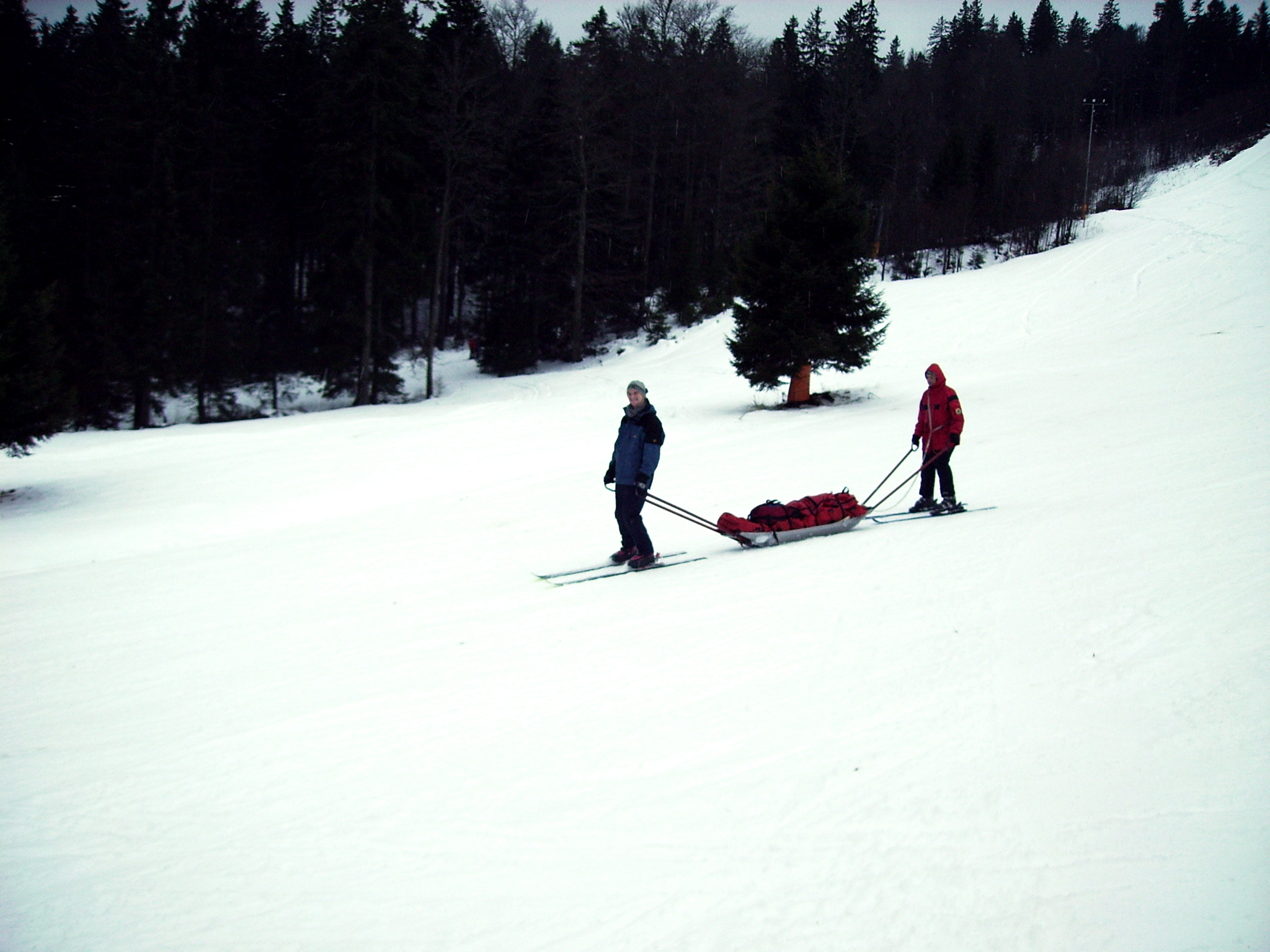 Akiaabfahrt am Skihang (Haldenköpfle, Notschrei, Schwarzwald) Descent with mountain sledge (Akia) on ski slope (Haldenköpfle, Notschrei, Schwarzwald)